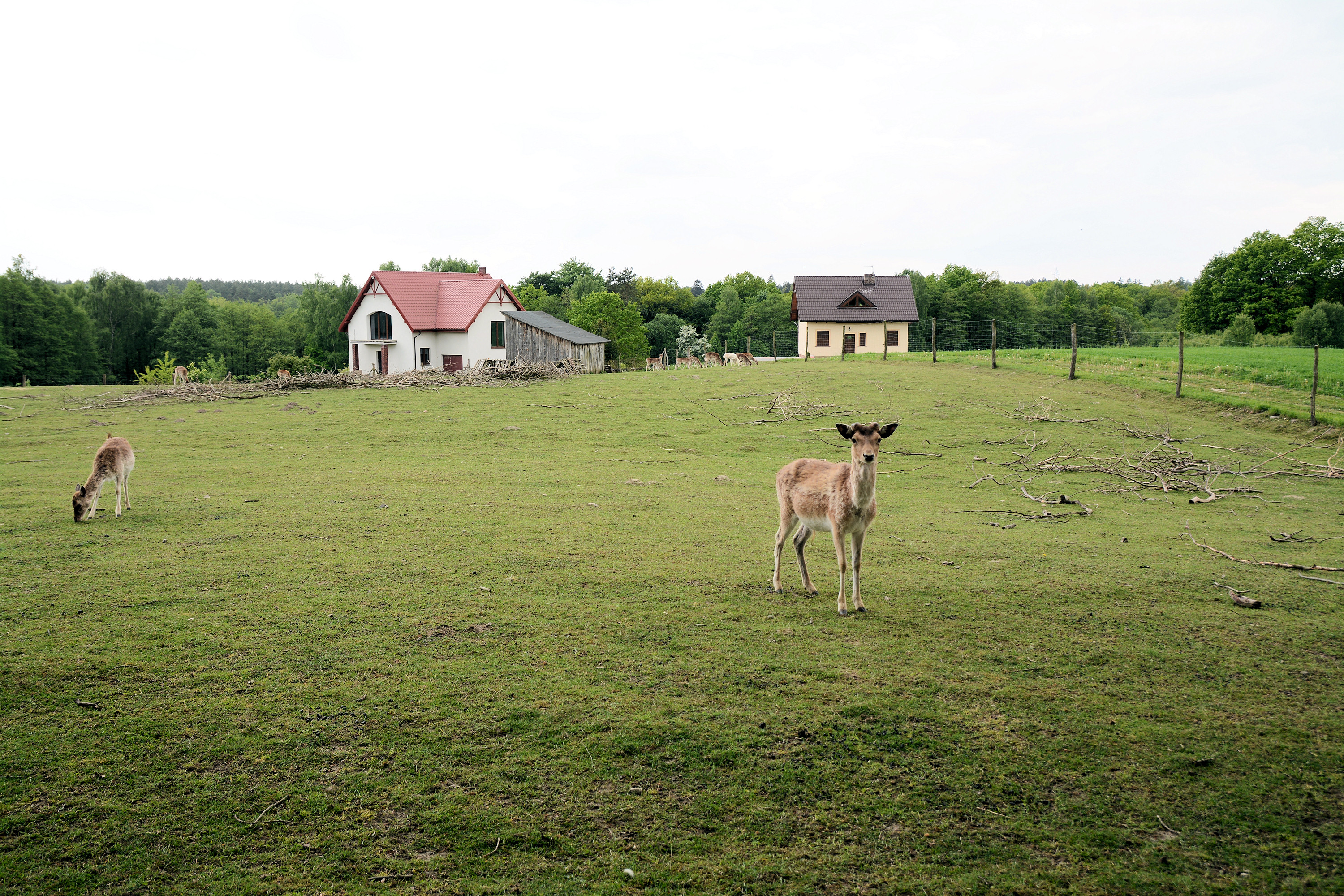 Żelisławie